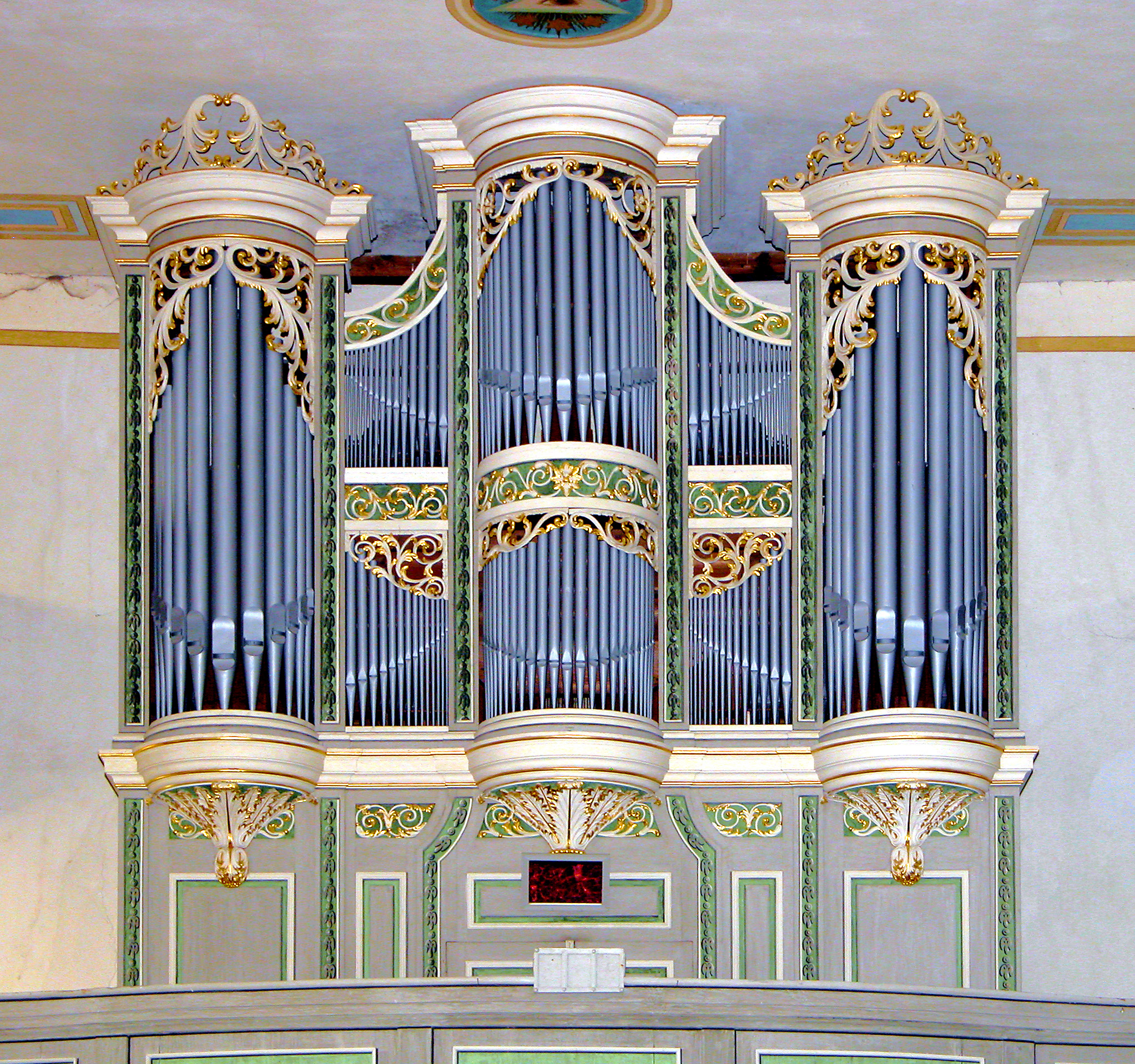 28.04.2011 04769 Sornzig (Sornzig-Ablaß): Dorfkirche, 1808-1810 erbaut. Orgel des Orgelbaumeisters Johann Gottlob Trampeli (1742-1812) aus Adorf im Vogtland. Es ist die einzige Trampeli-Orgel in Mittelsachsen. [DSCNn2455.TIF]20110428240DR.JPG(c)Blobelt